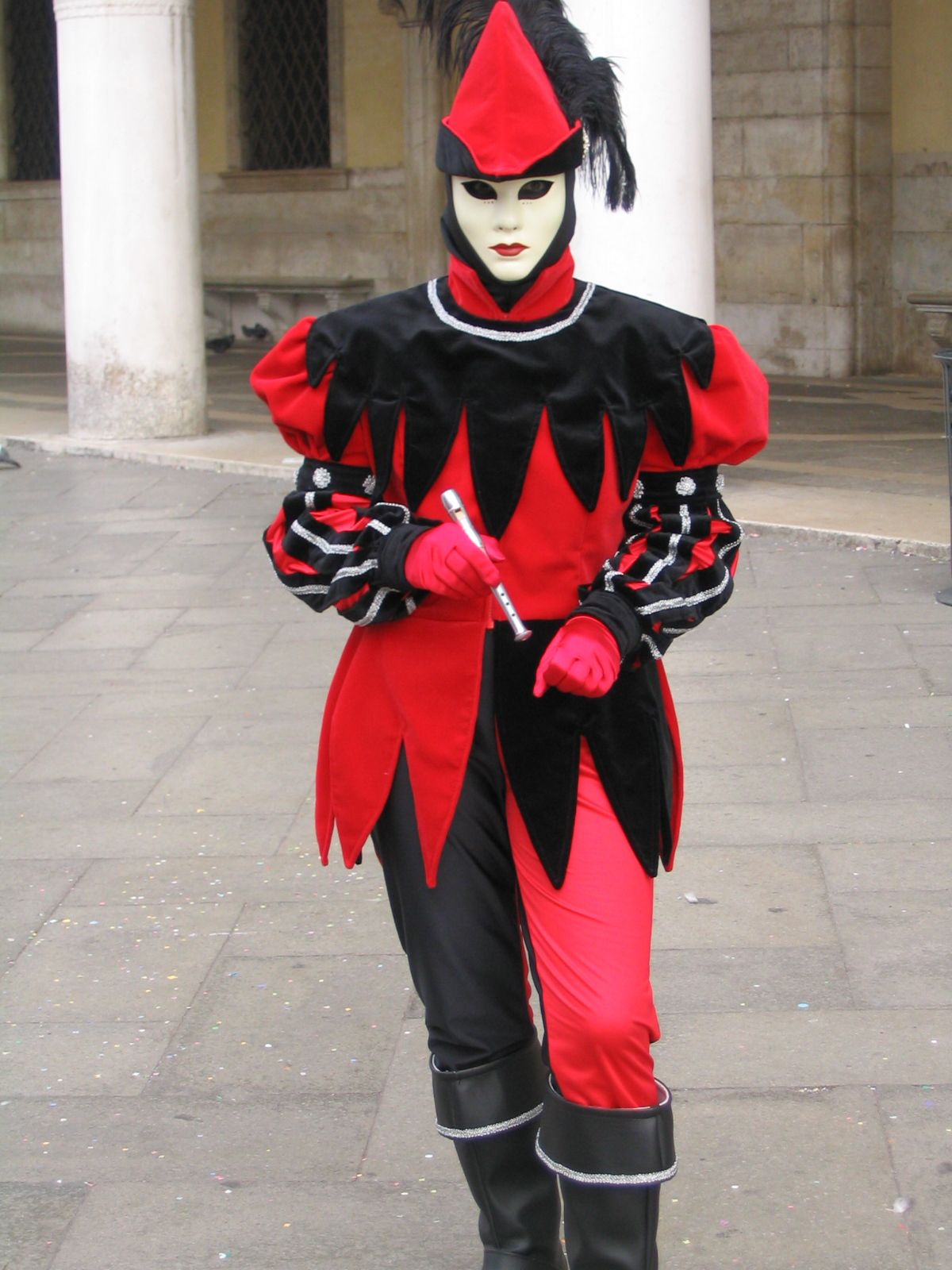 Carnevale di Venezia